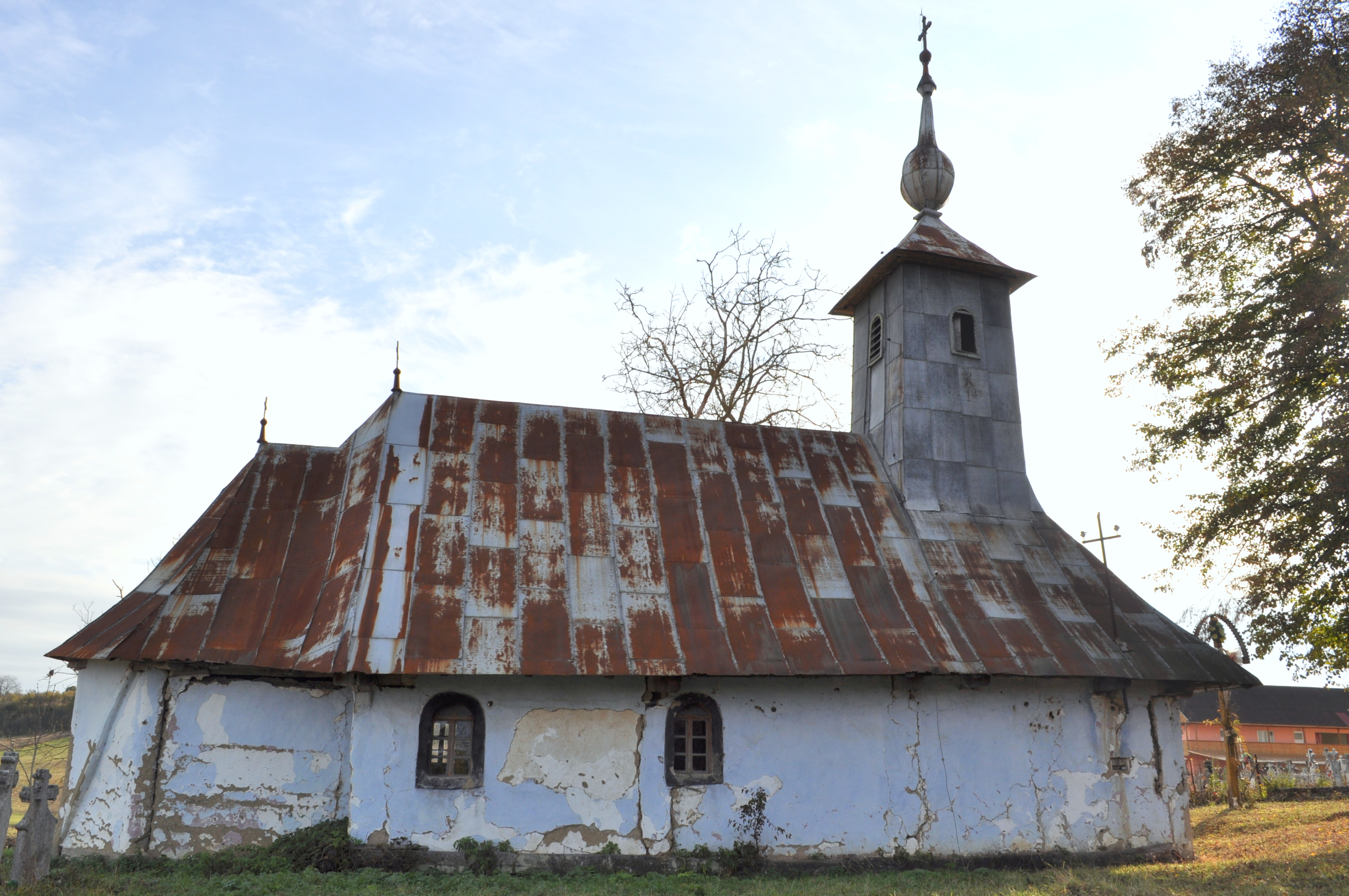 Biserica de lemn „Nașterea Maicii Domnului” din Săucani, județul Bihor